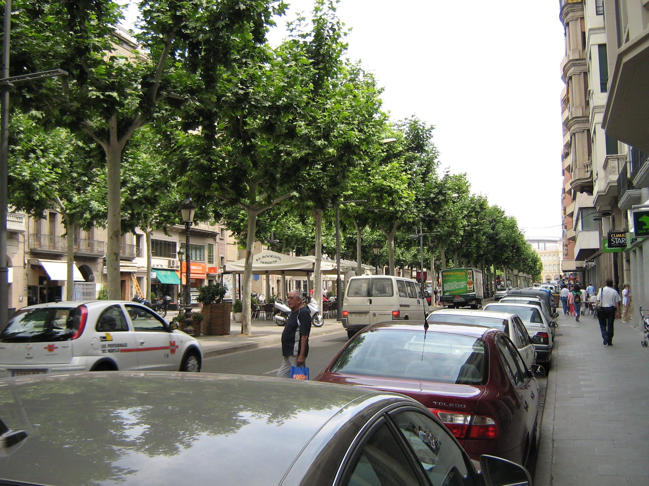 Град Ллейда. Централна улица.